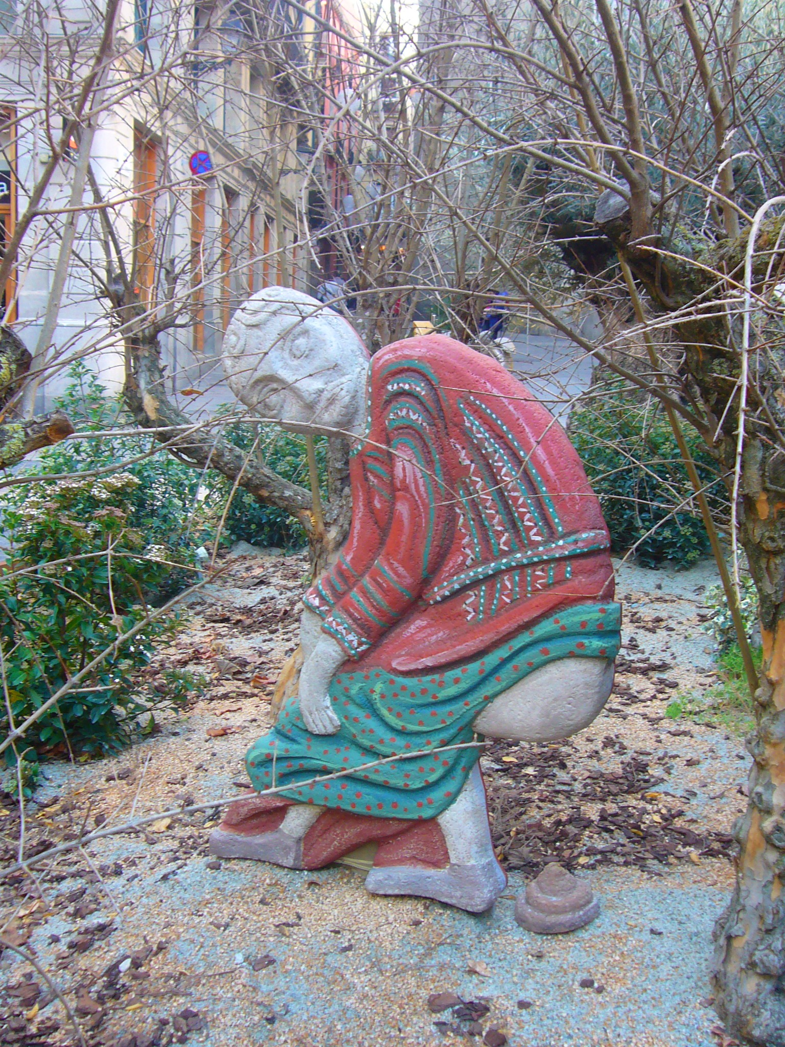 Pessebre a la plaça de Sant Jaume - caganer